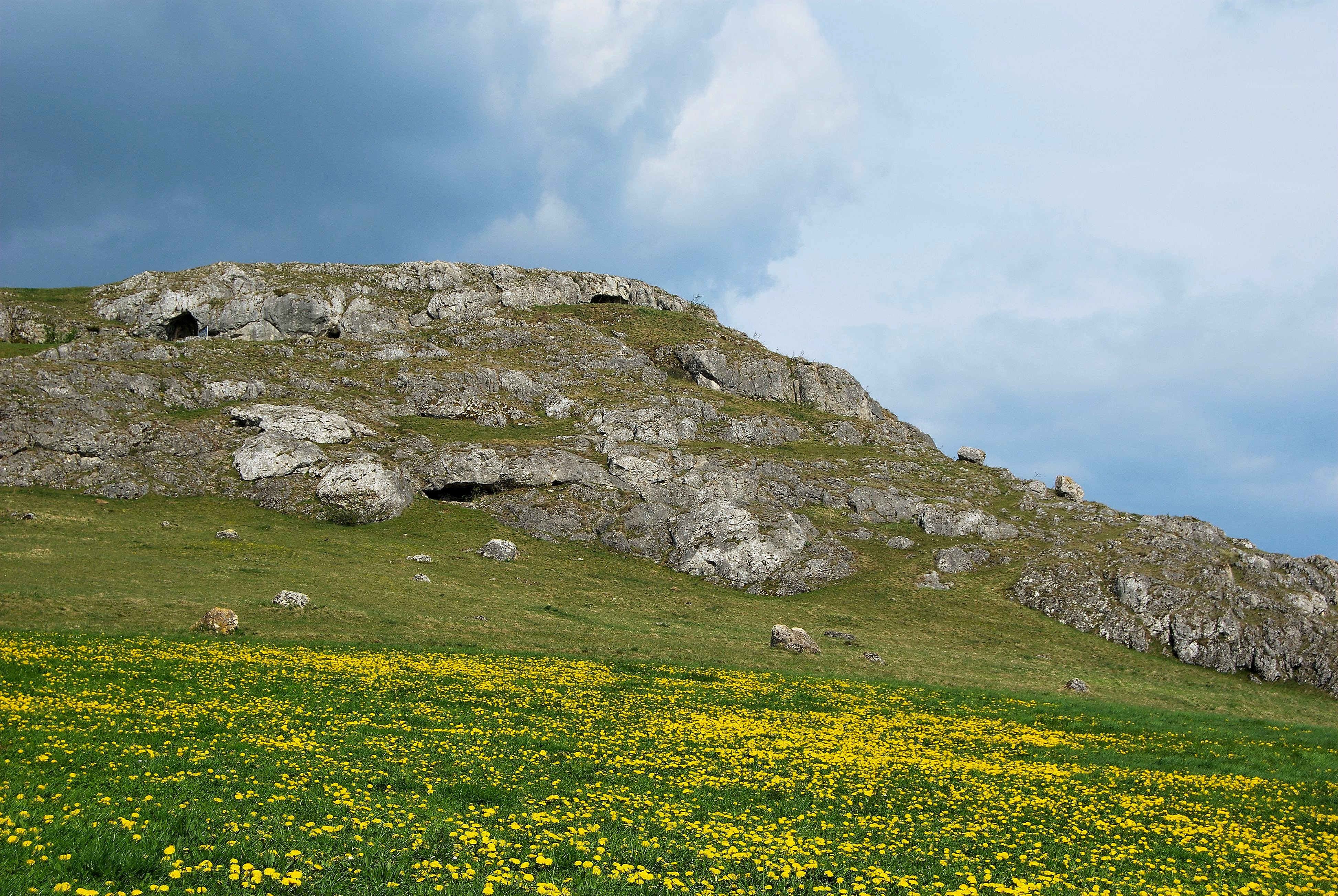 Ofnethöhlen bei Holheim , Wohnhöhle der Frühmenschen im Malmkalkfels mit ur- und frühgeschichtlichen Funden